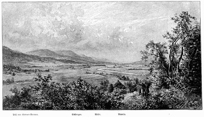 Das Idistavisofeld, Abbildung aus Dr. Paul Knötel, Bildatlas der Deutschen Geschichte, Bielefeld und Leipzig, 1895